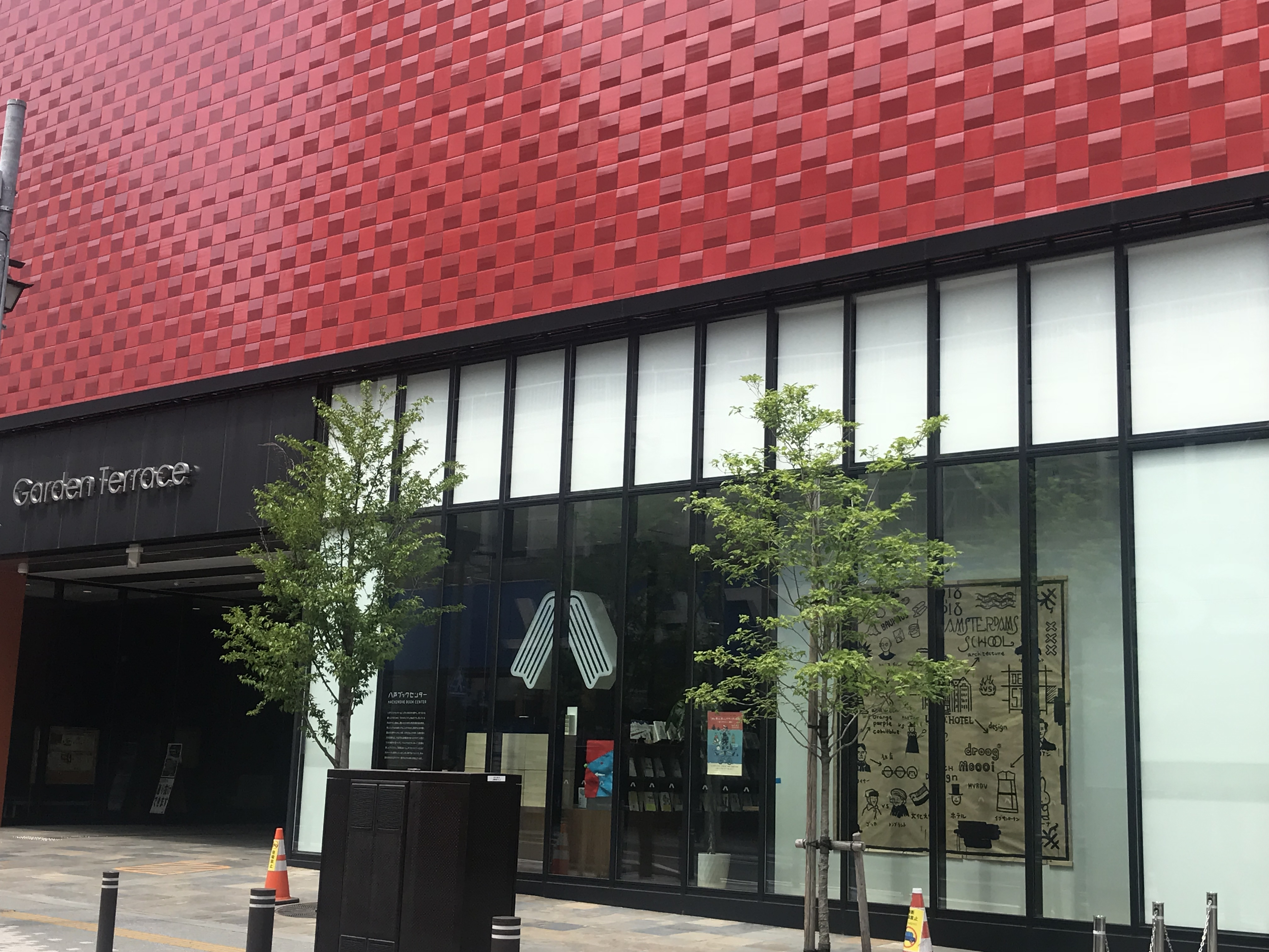 八戸ブックセンター（2018年5月12日撮影）